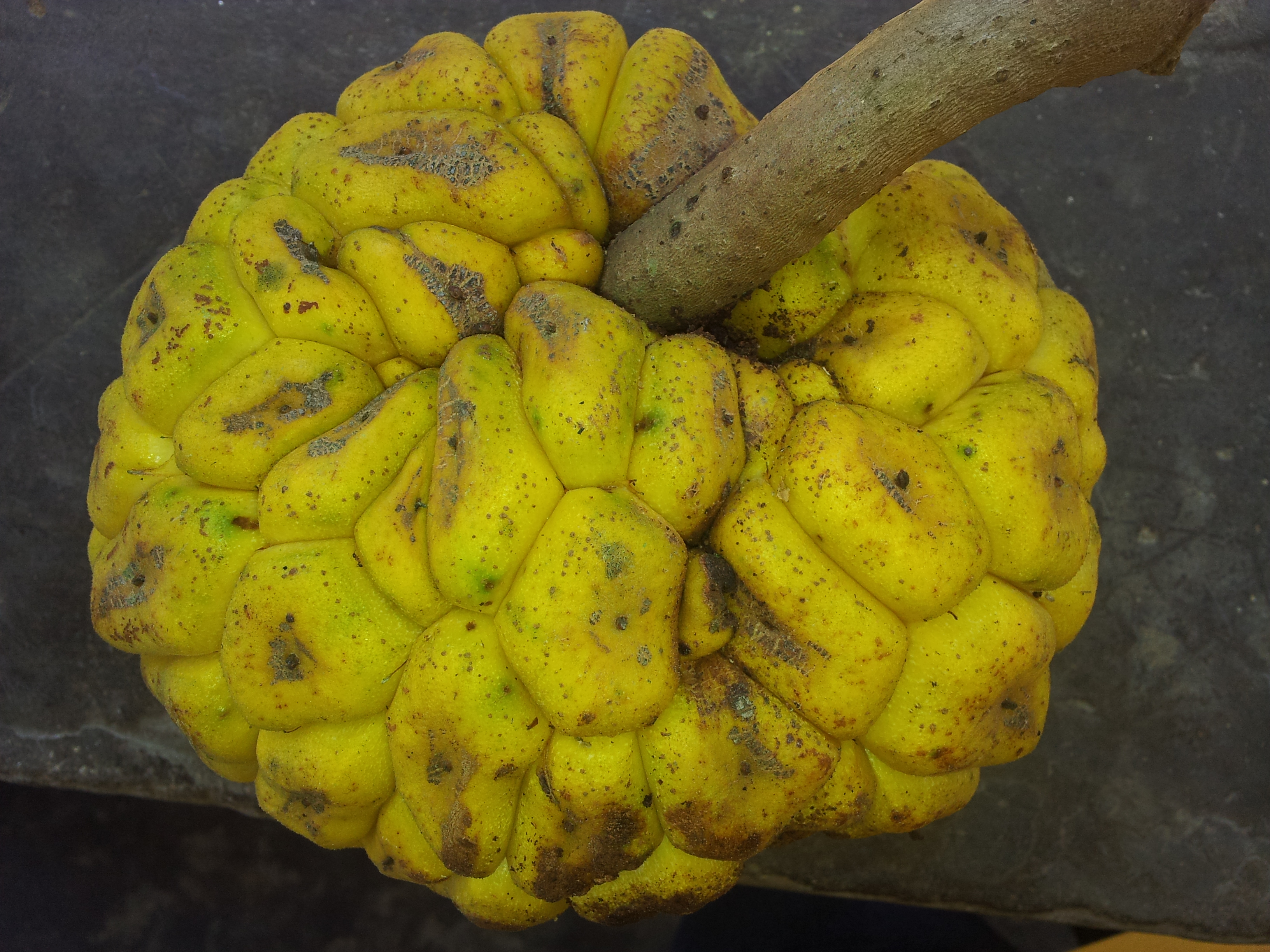 Fruits de Myrianthus arboreus du village de Tayap (produits forestiers non ligneux)